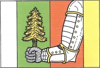 Býšovec, vlajka. List tvoří čtyři svislé pruhy, bílý, zelený, červený a žlutý, v poměru 1 : 2 : 2 : 1. Ze žlutého pruhu vyniká přes červený pruh do zeleného žlutě zdobené bílé obrněné pravé rameno, držící v drátěné rukavici žlutý smrk. Poměr šířky k délce listu je 2 : 3.